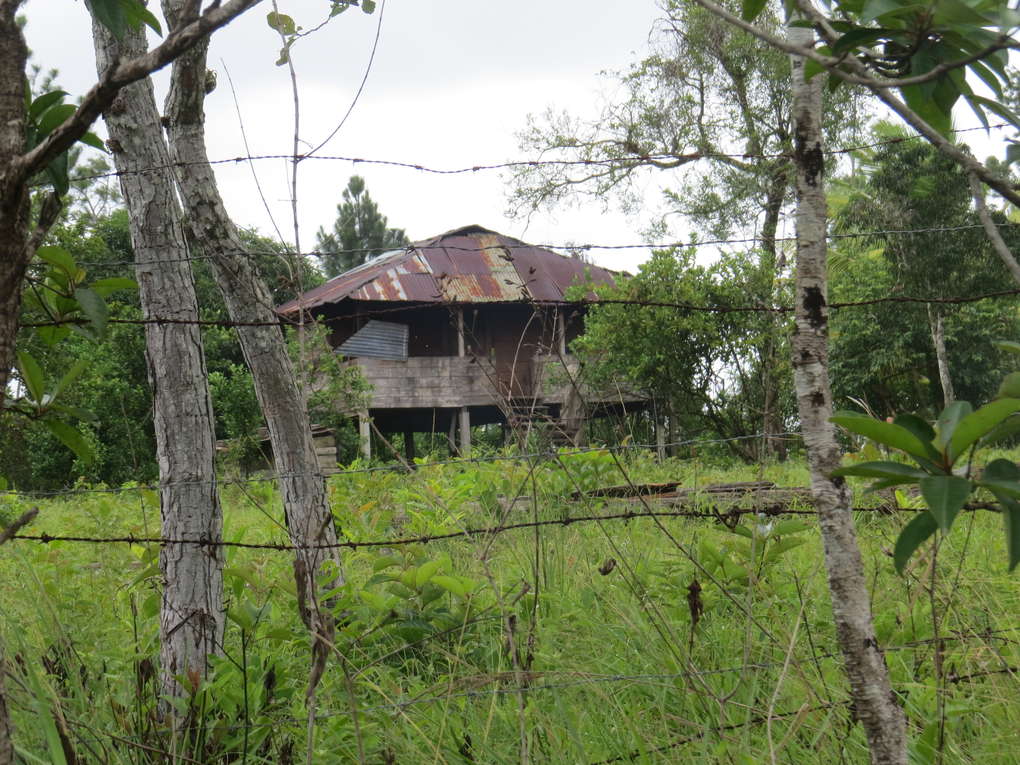 Finca BAWISA a 25 kilómetros de Waspam, Rio Coco. Nicaragua